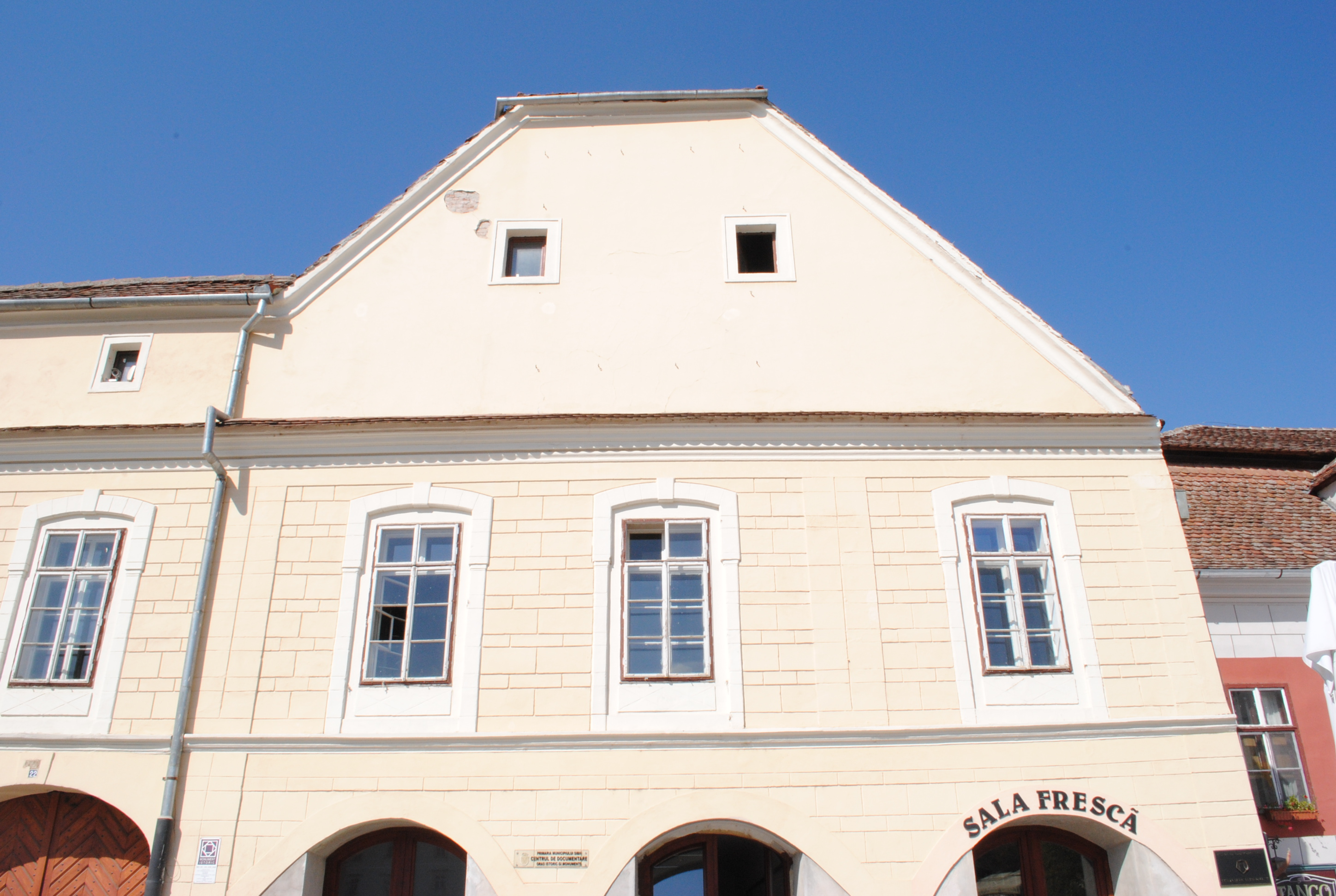 Casă (în curte fragmente ale incintelor I și II), sec. XV - XVI,1631, 1694, sec. XVIII